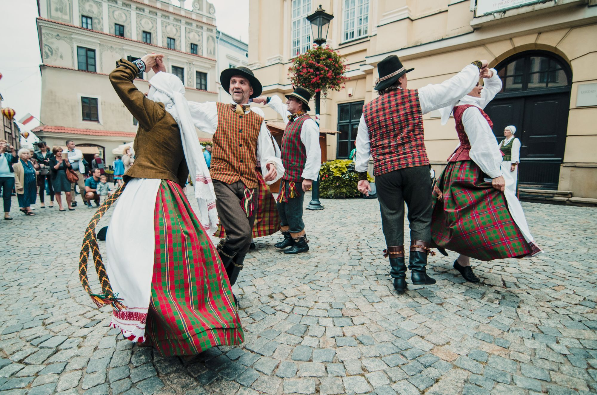 Muzyka i taniec tradycyjny podczas Jarmarku Jagiellońskiego